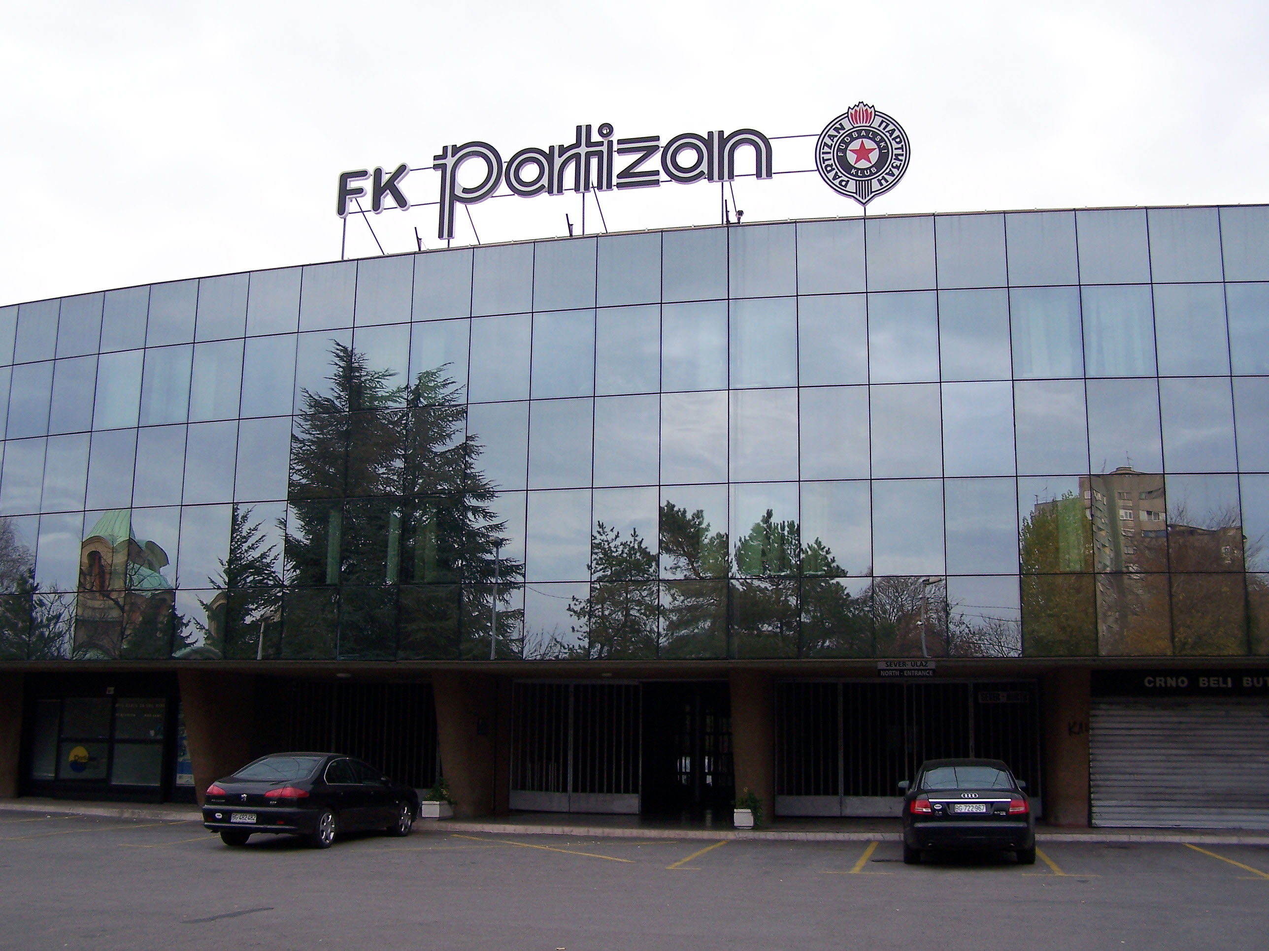 Partizan Stadium in Belgrade